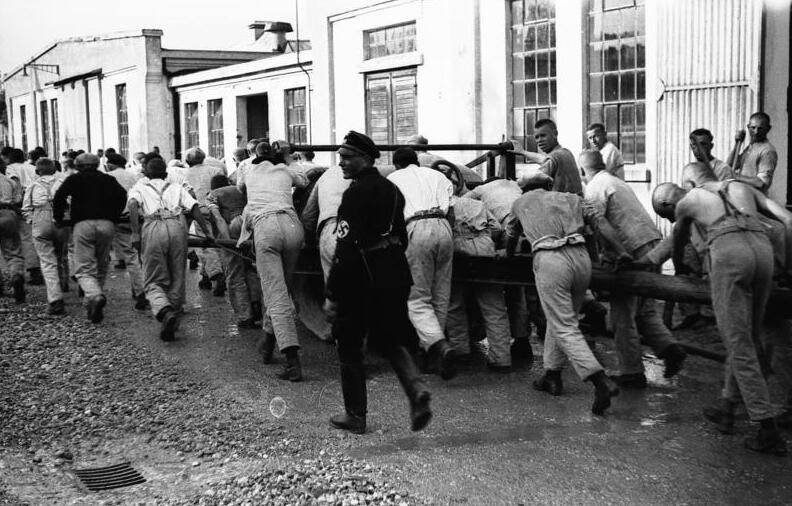 Dachau, Konzentrationslager Schutzhaftlager Dachau.- Häftlinge bei Zwangsarbeit, Ziehen eines Wagens.